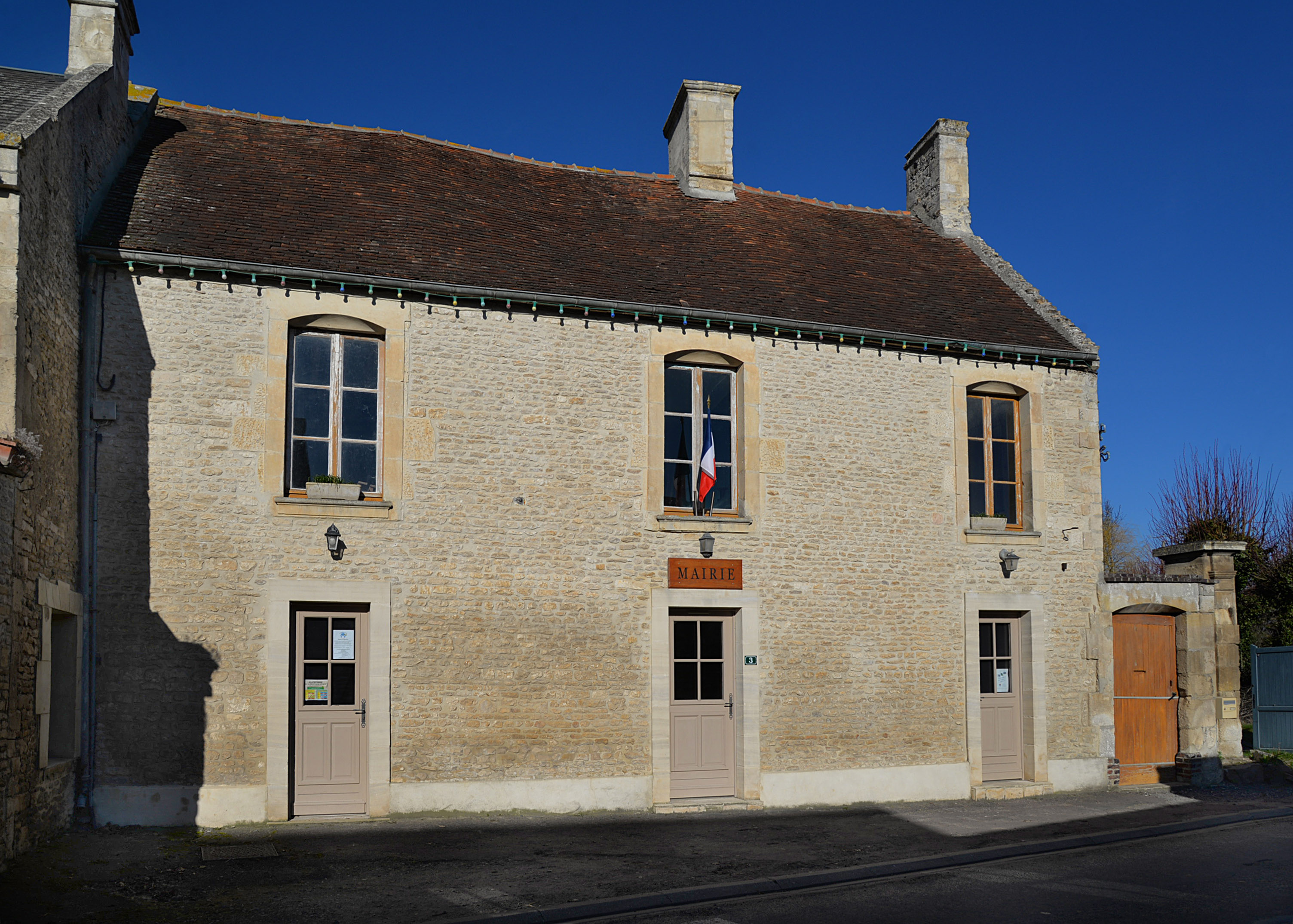 Soignolles (14)